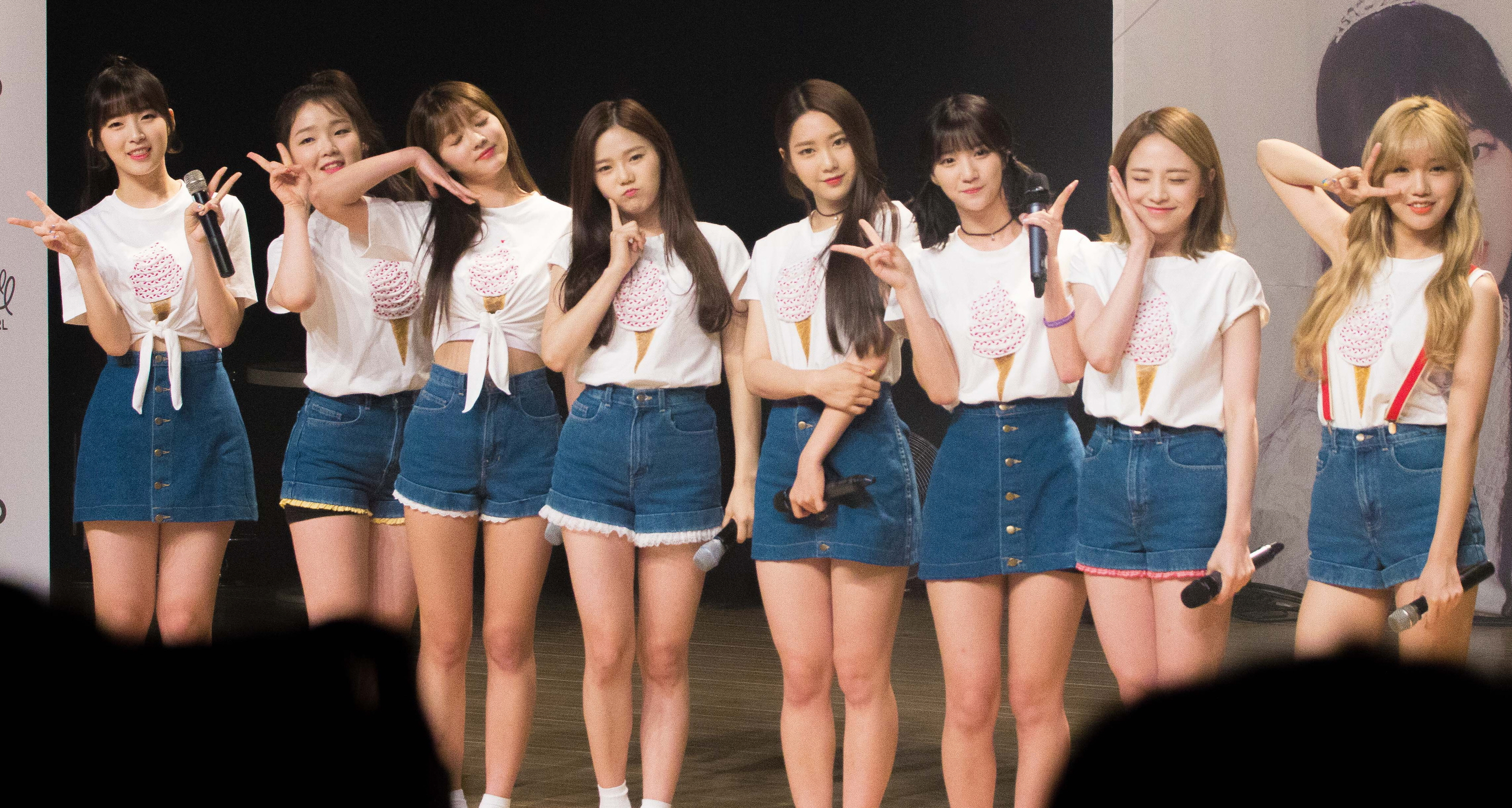 20160702 오마이걸 미라클 데이 단체